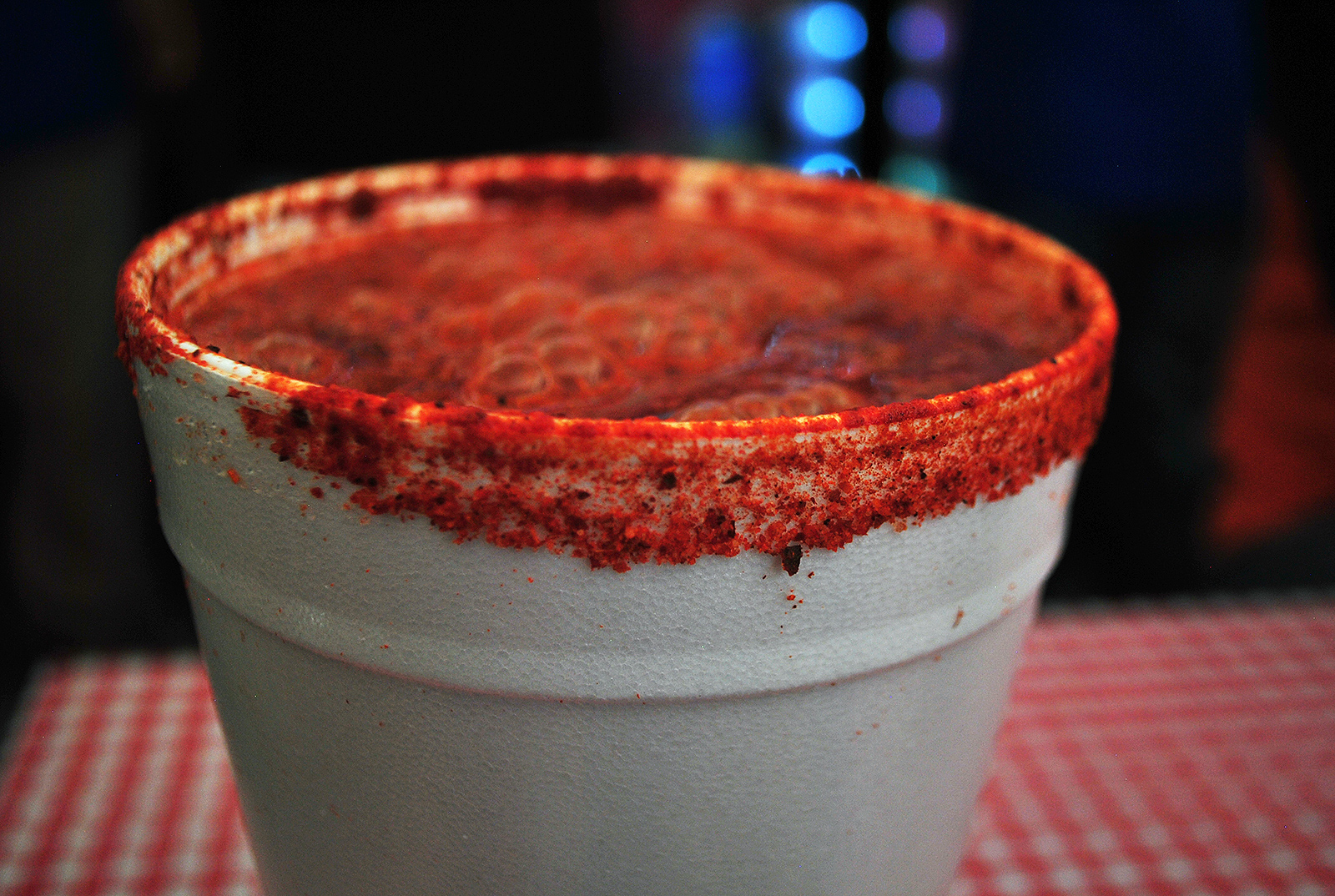 Bevanda alcolica a base di birra. Il contorno del barattolo viene bagnato con limone e poi cosparso con sale e peperoncino in polvere